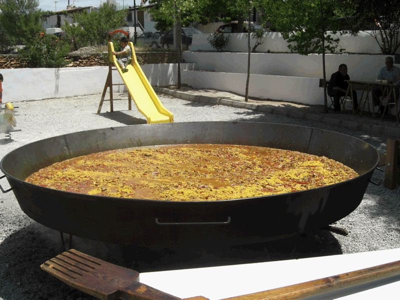 Tracicional paella para los visitantes en las fiestas.